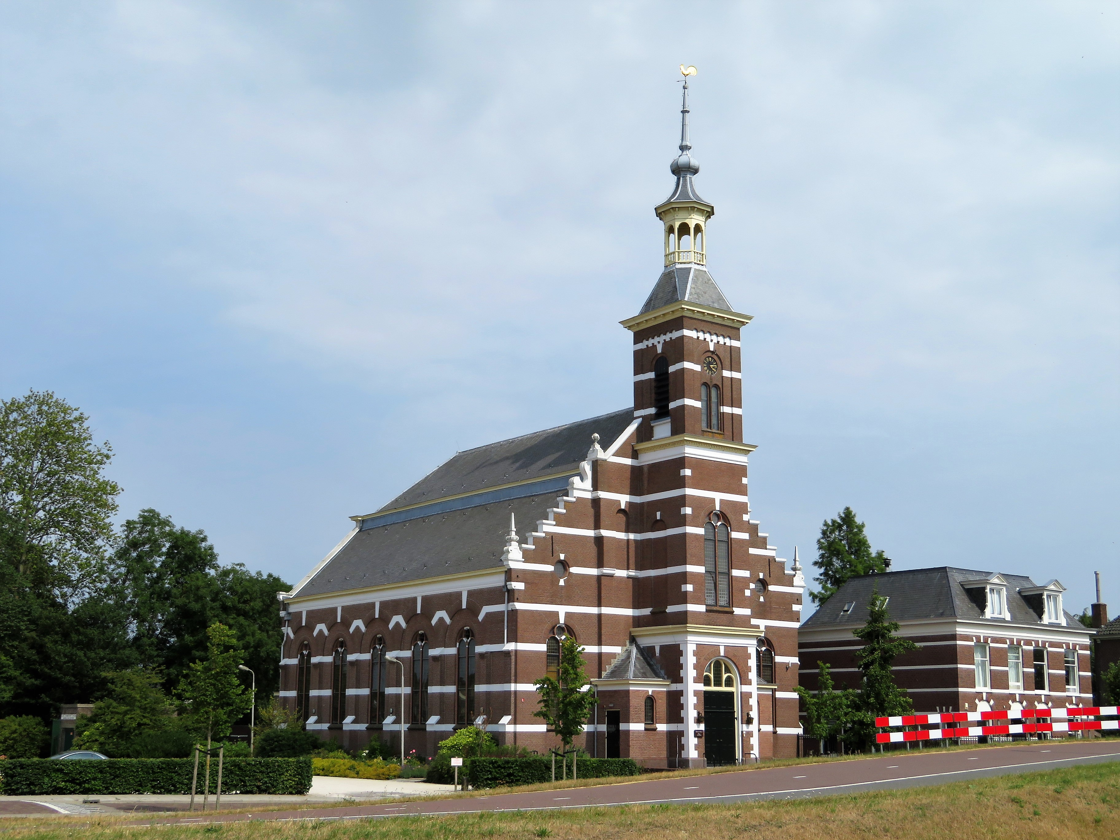 Hoofdstraatkerk, Leiderdorp, Nederland